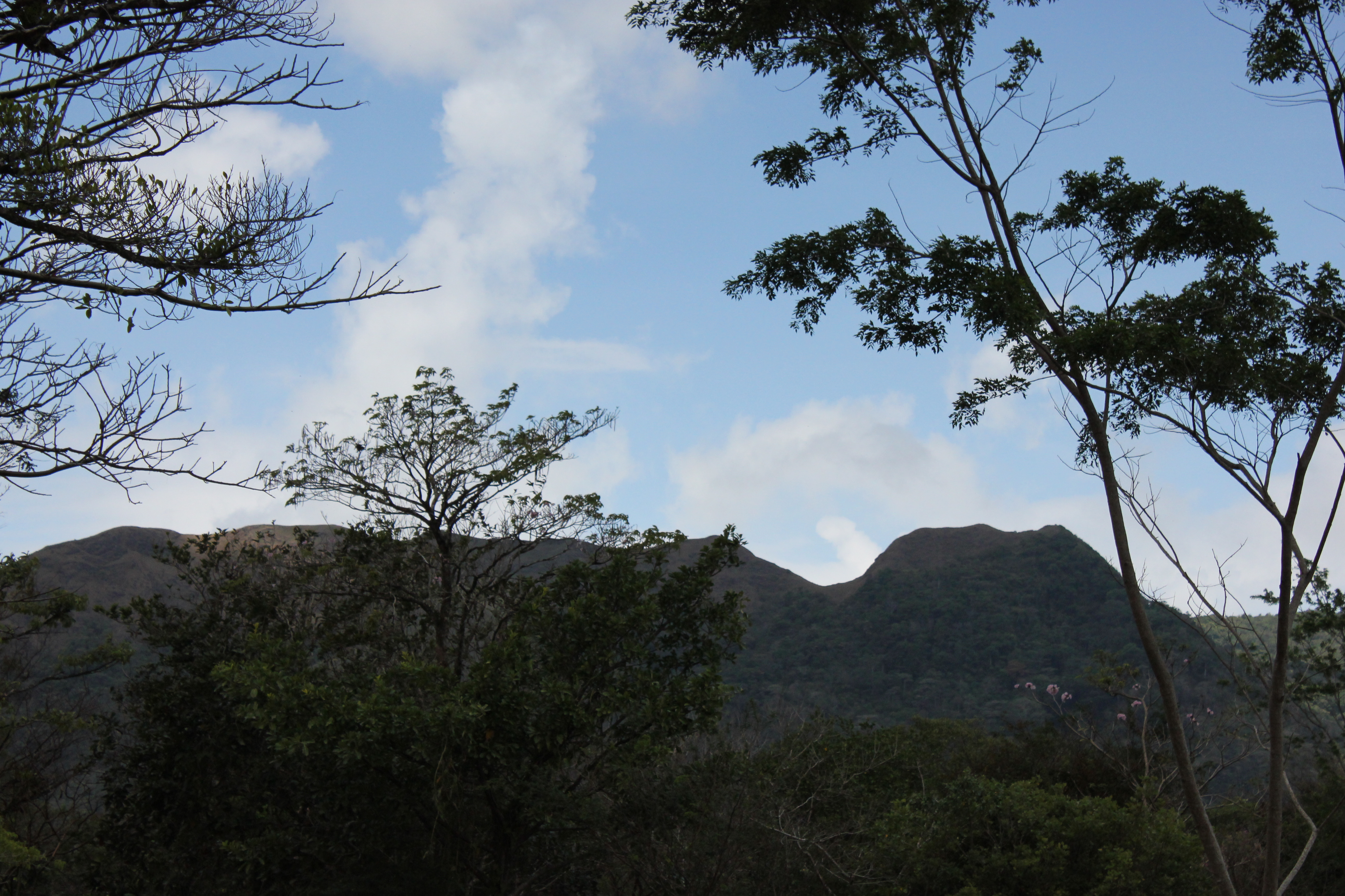 Montaña con forma de mujer acostada llamada "La India Dormida" en El Valle de Antón, Panamá